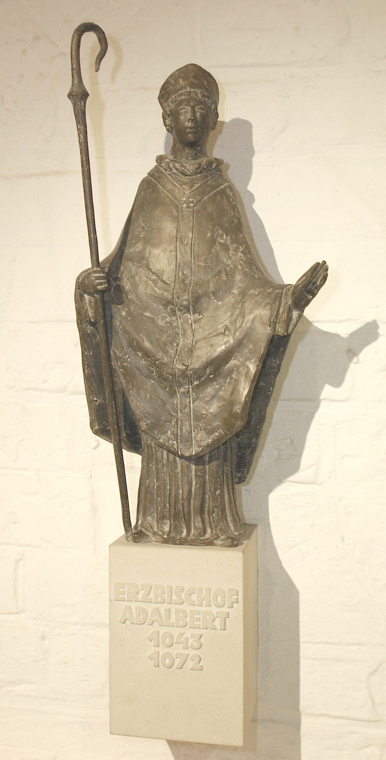 Bremer Dom (Museum): Erzbischof Adalbert (1043–1072), Bronzefigur von Heinrich G. Bücker, 1987